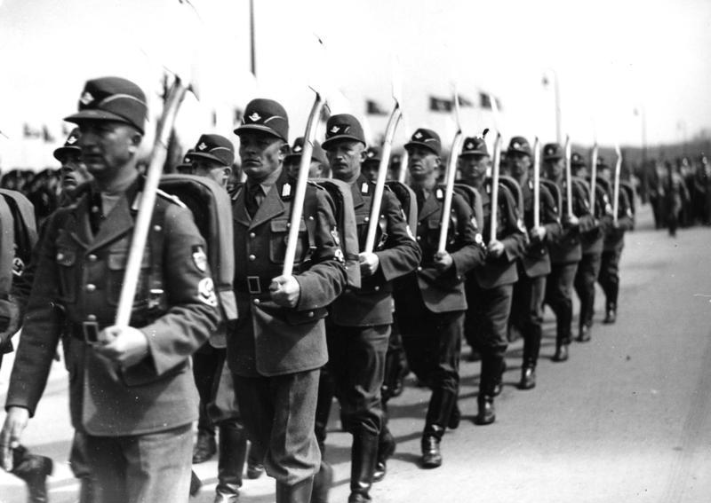 Arbeitsdienst auf dem Wege zu einer Kundgebung der NSDAP